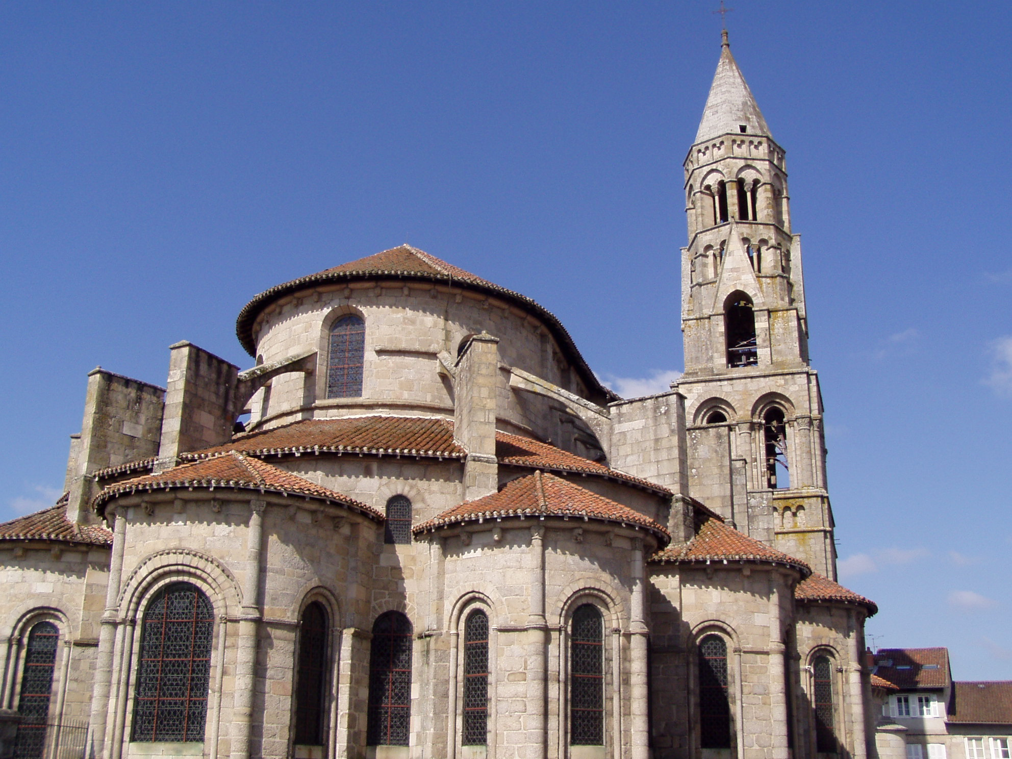 Photo de l'église de Saint-Léonard-de-Noblat dans la Haute-Vienne